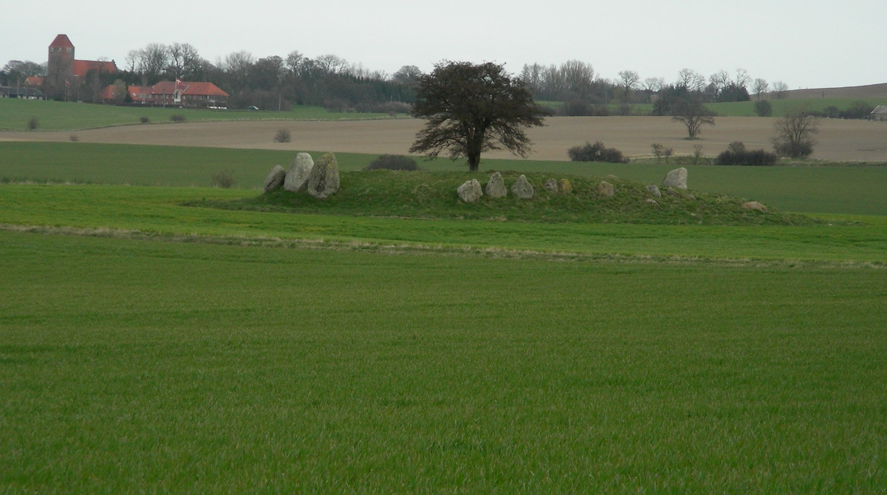 Busemarke Dysse, Møn, Denmark